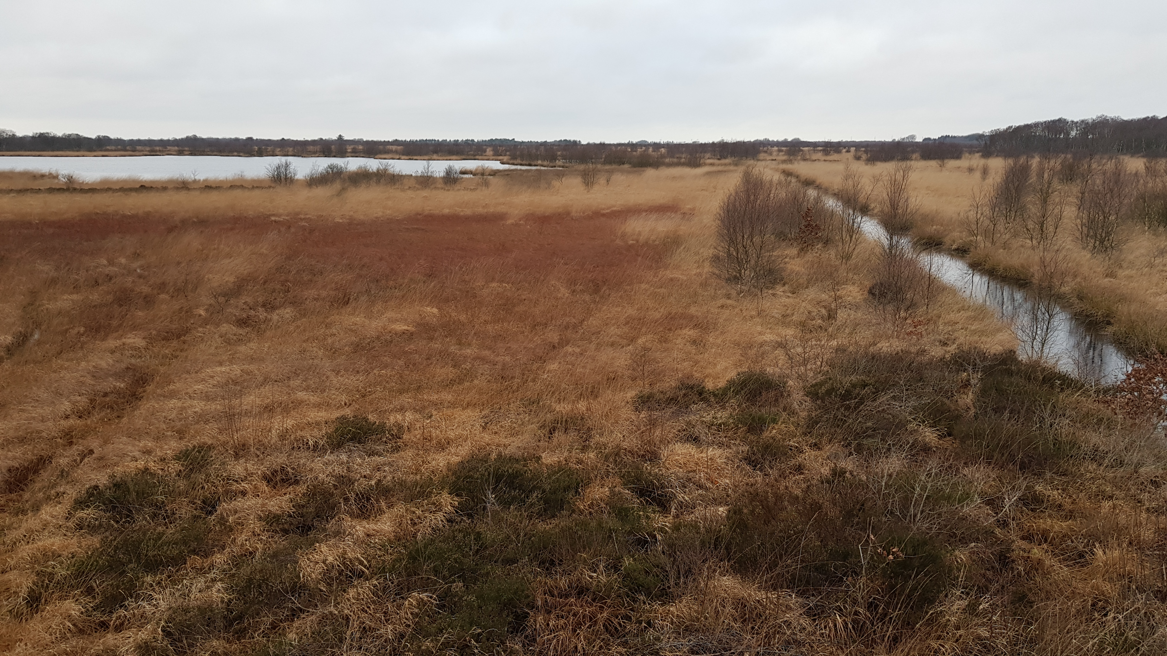 Kongens Mose: Udsigt fra fugletårnet ved Teltkrovej